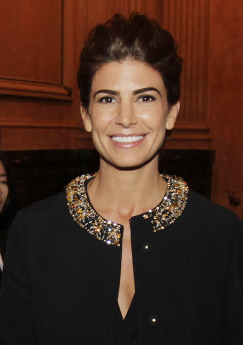 Juliana Awada, diseñadora argentina